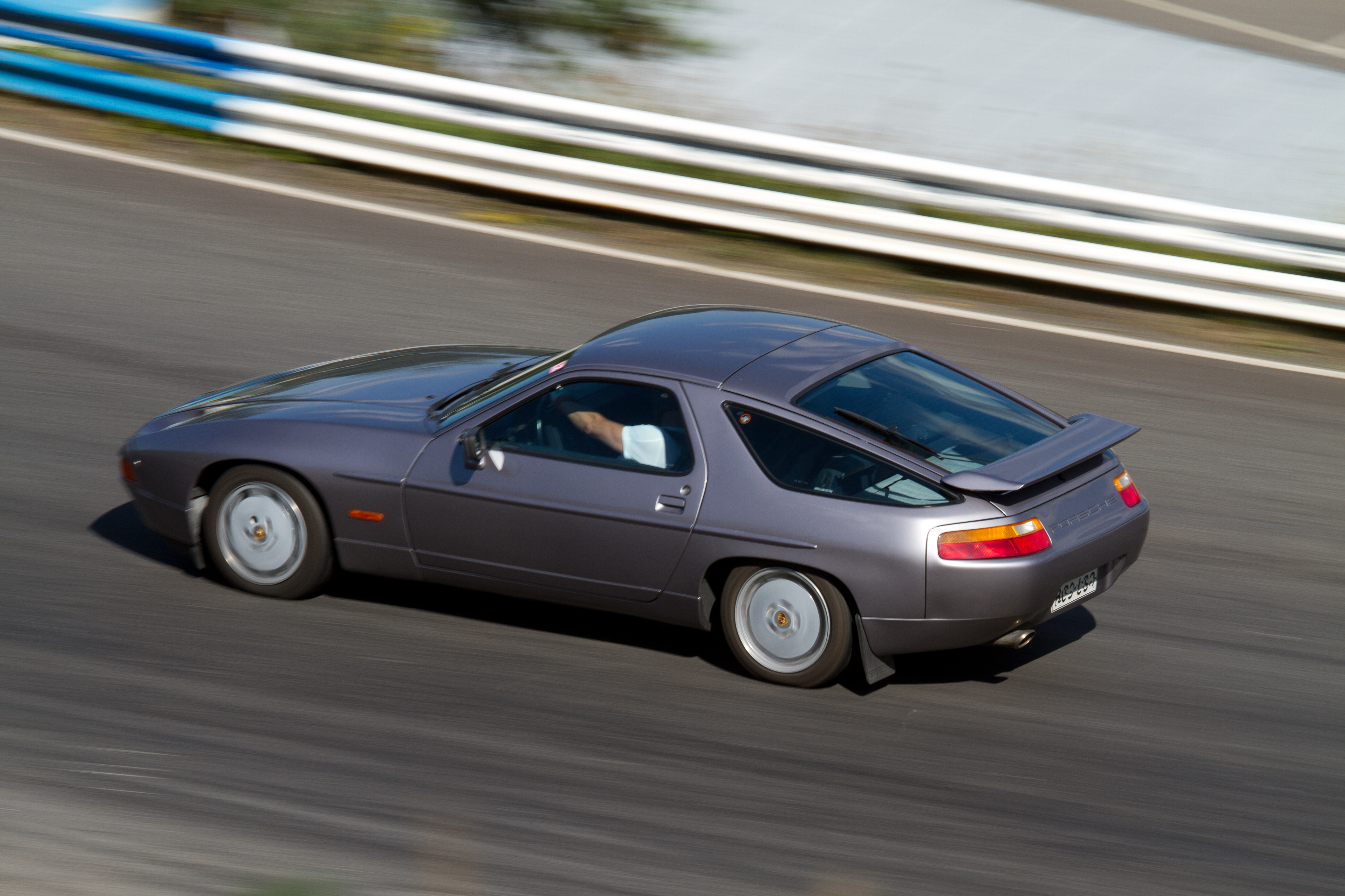 PCF Ahvenisto 2013